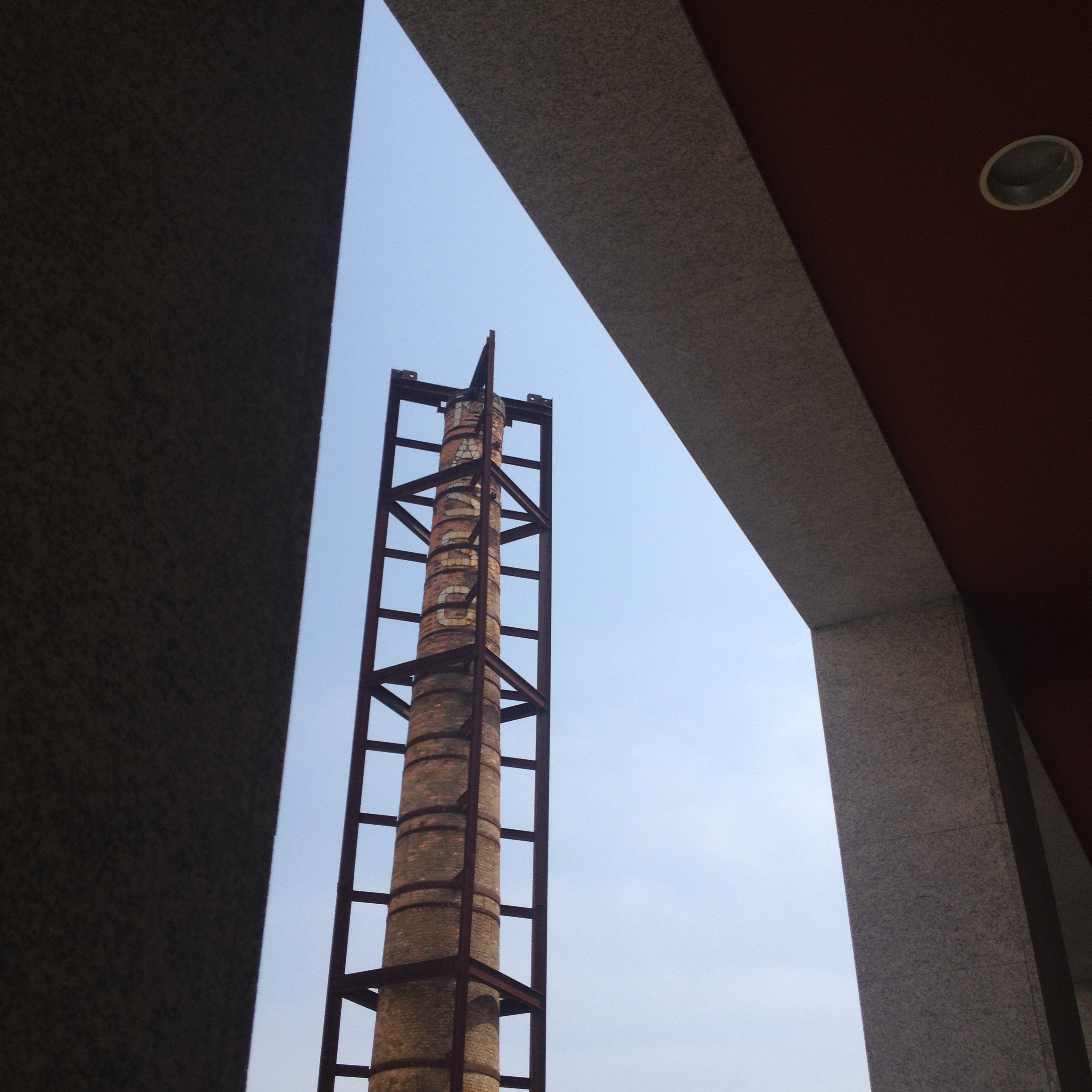 Chimenea da fábrica de Massó de Bueu no seu novo emplazamento.